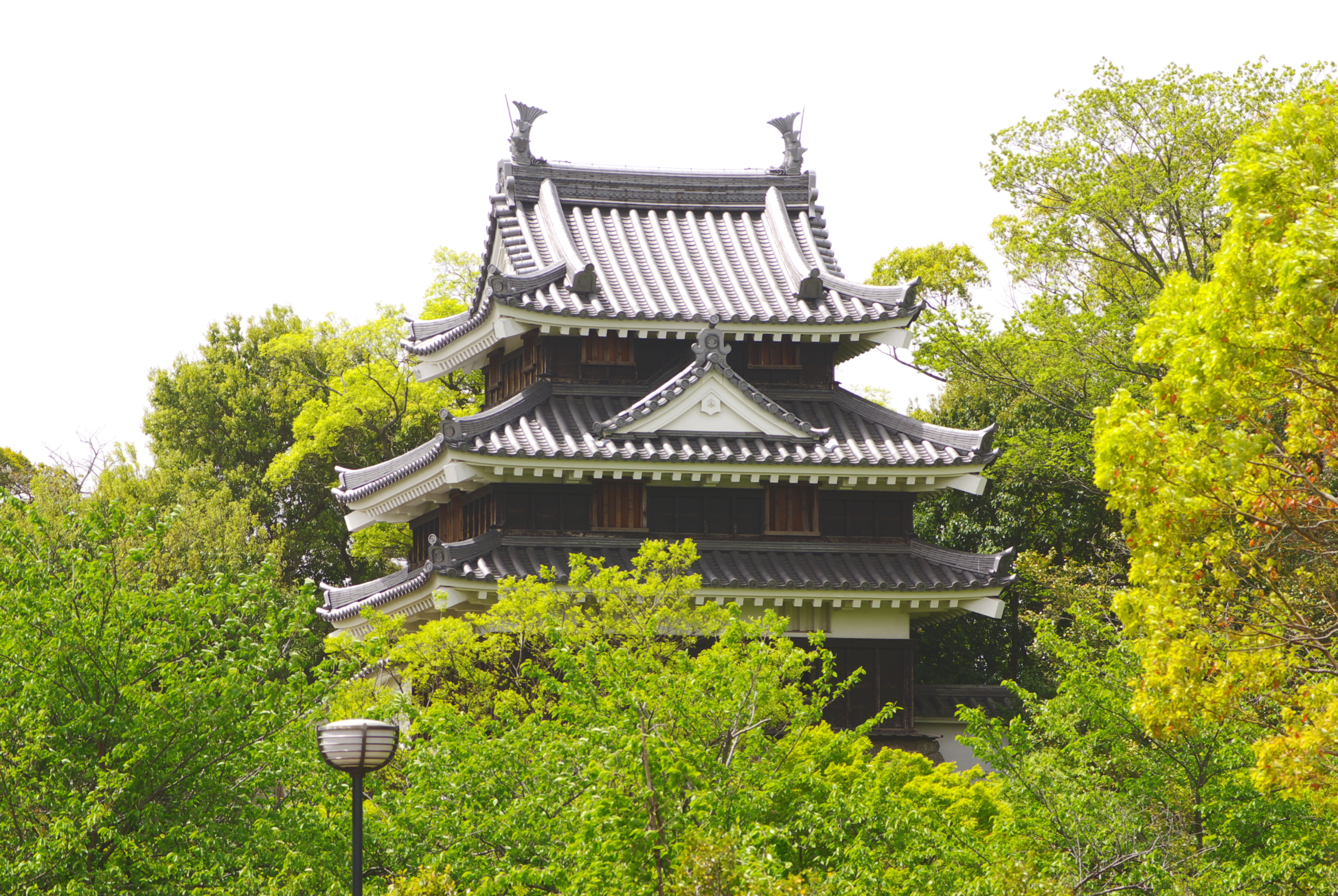 愛知県西尾市の西尾城本丸丑寅櫓